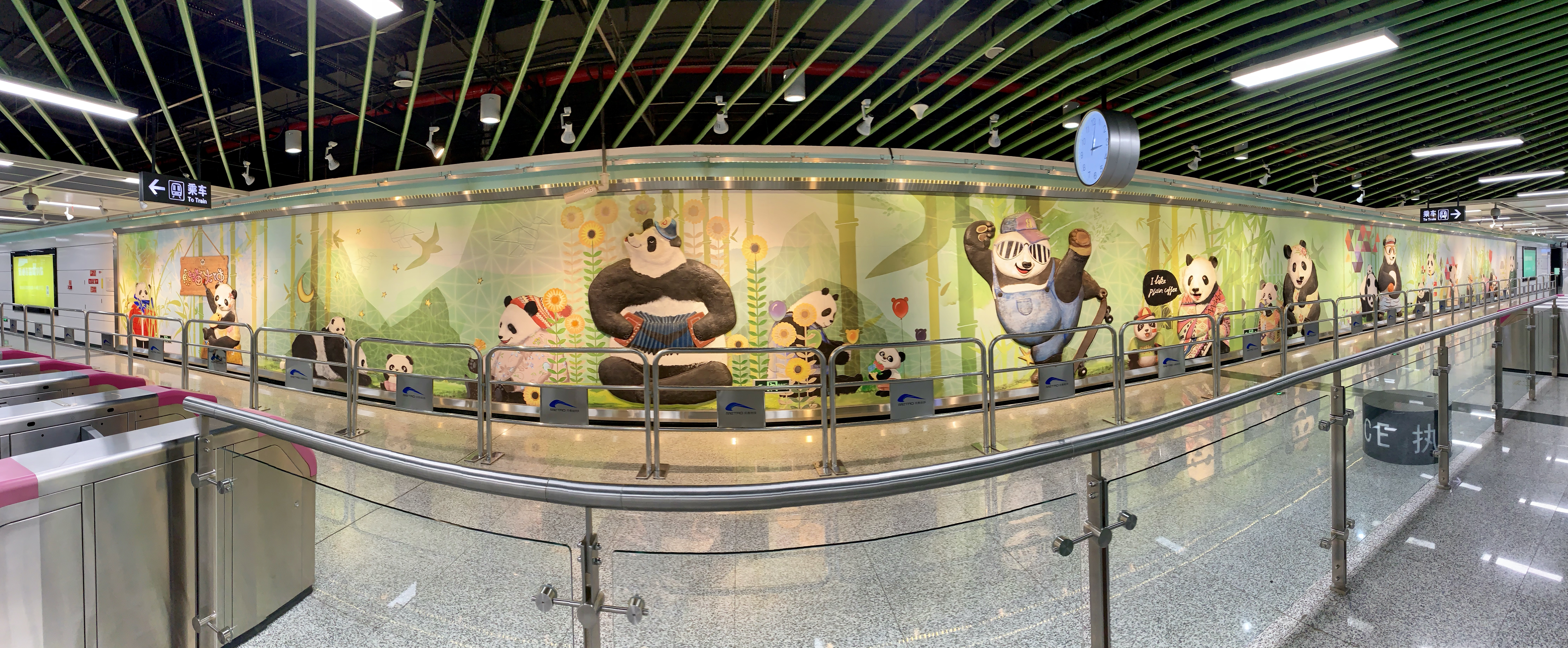 成都地铁熊猫大道站